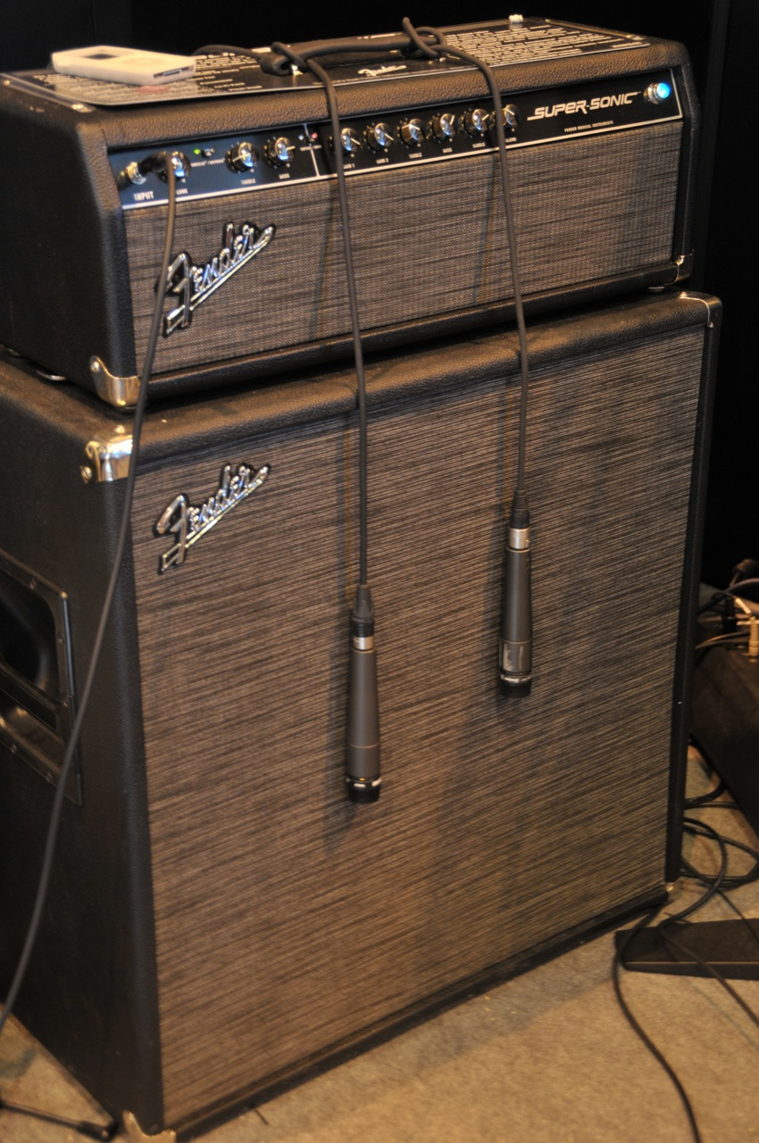 Fender Supersonic stack 4x10 Salon de la Musique et du Son 2008